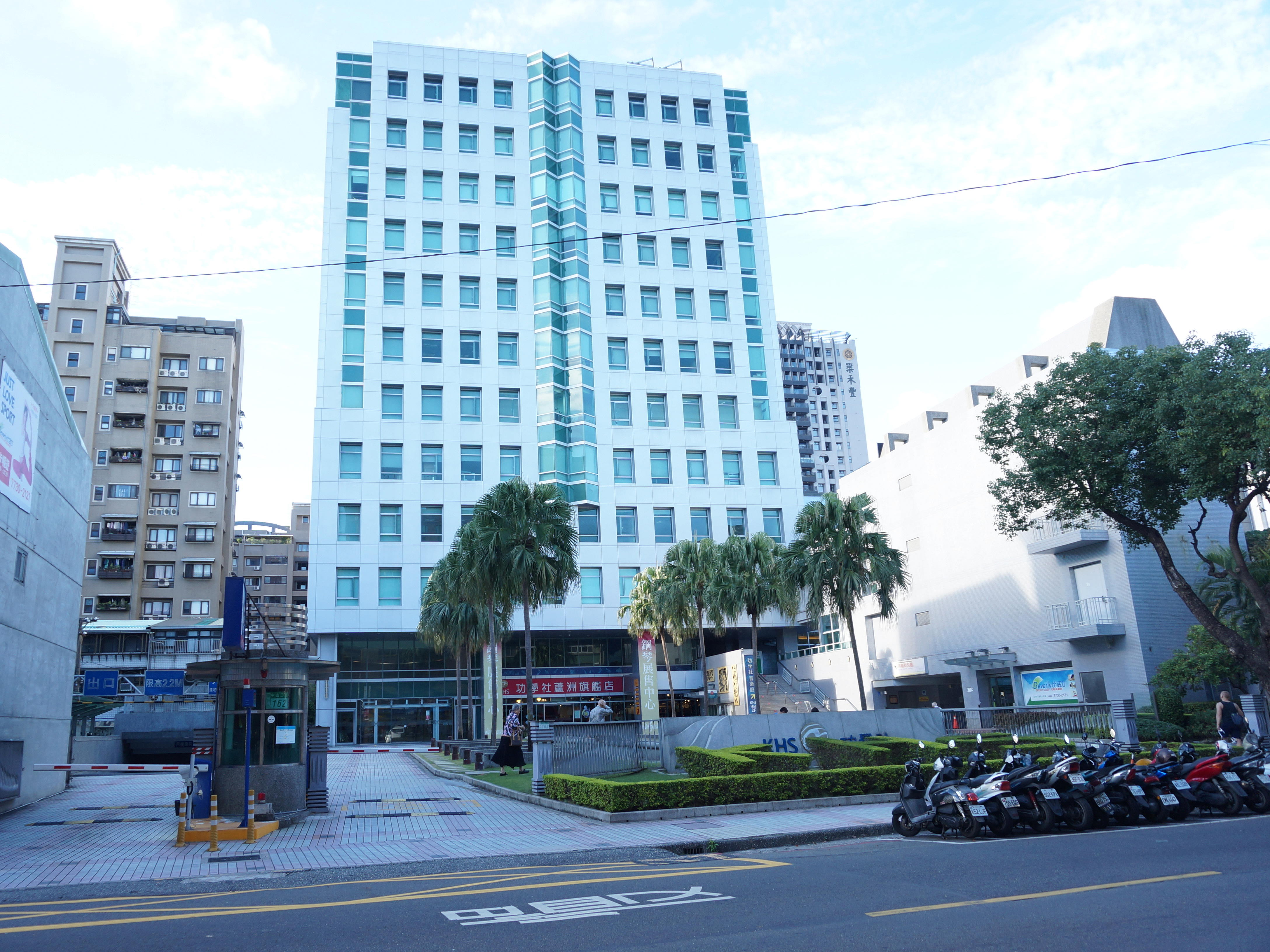 功學社企業總部營運大樓，地址：新北市蘆洲區中山二路162號。